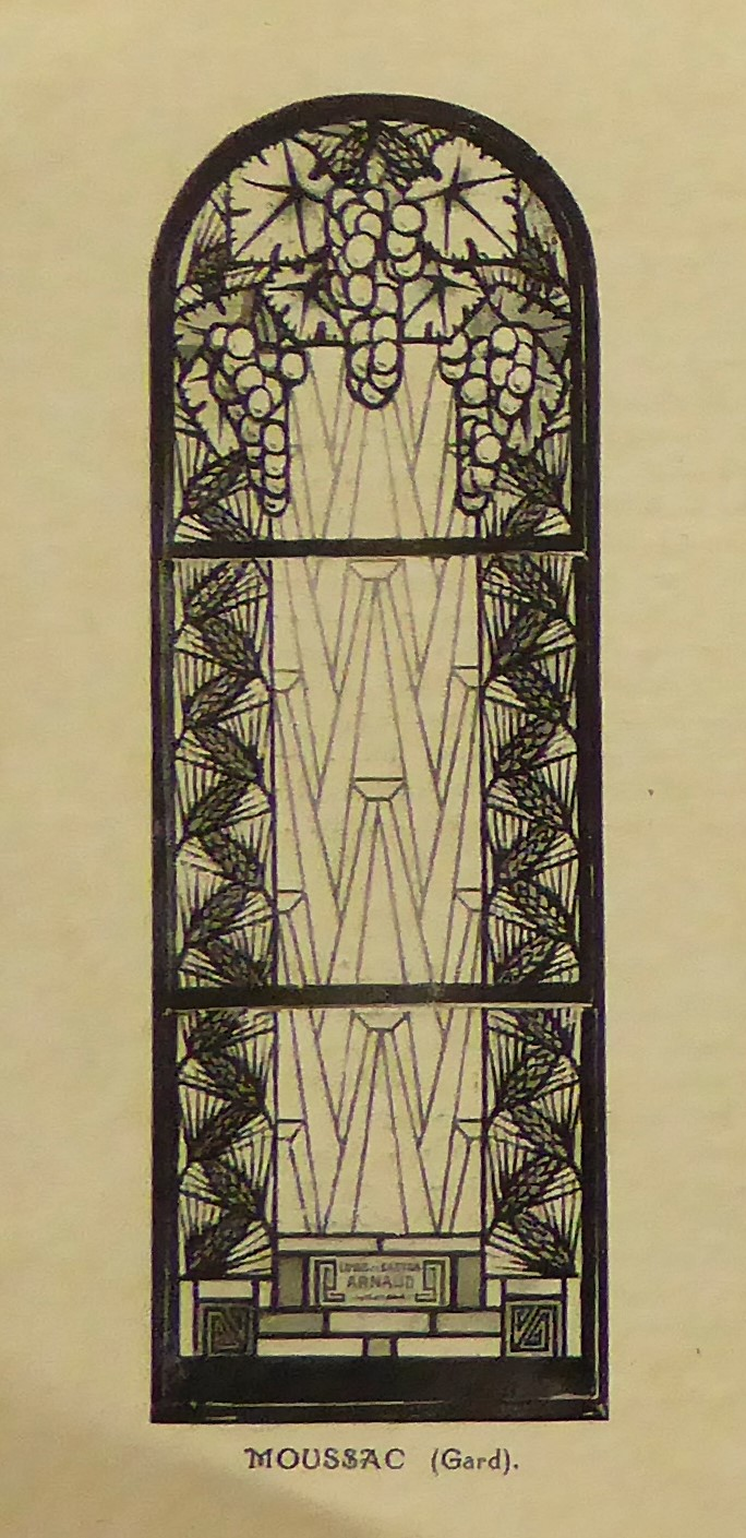 photographie de vitrail (1928) dans le catalogue de Charles Lorin et Cie (années 1930), temple protestant de Moussac, Gard, France.